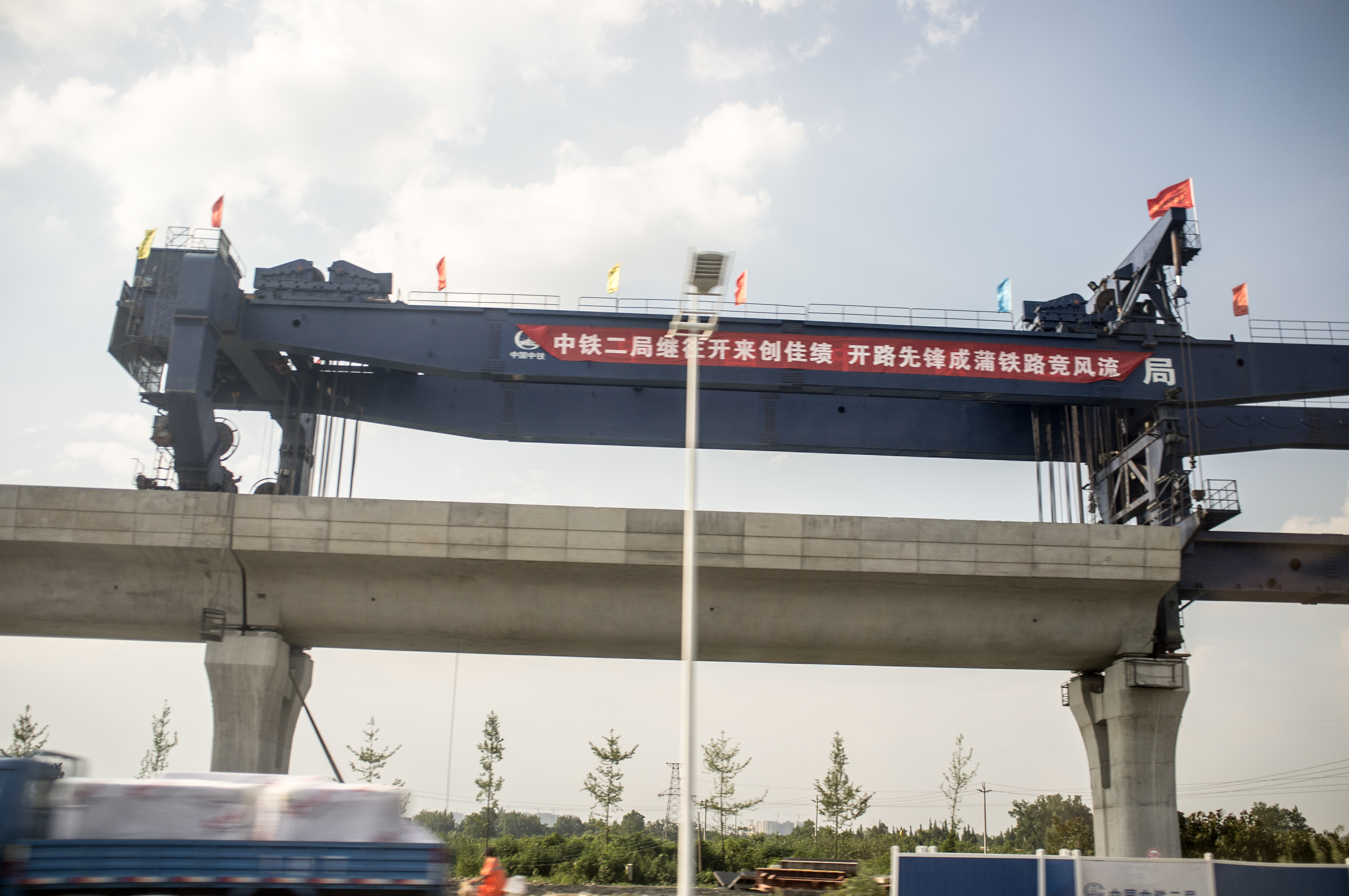 建造中的成蒲铁路